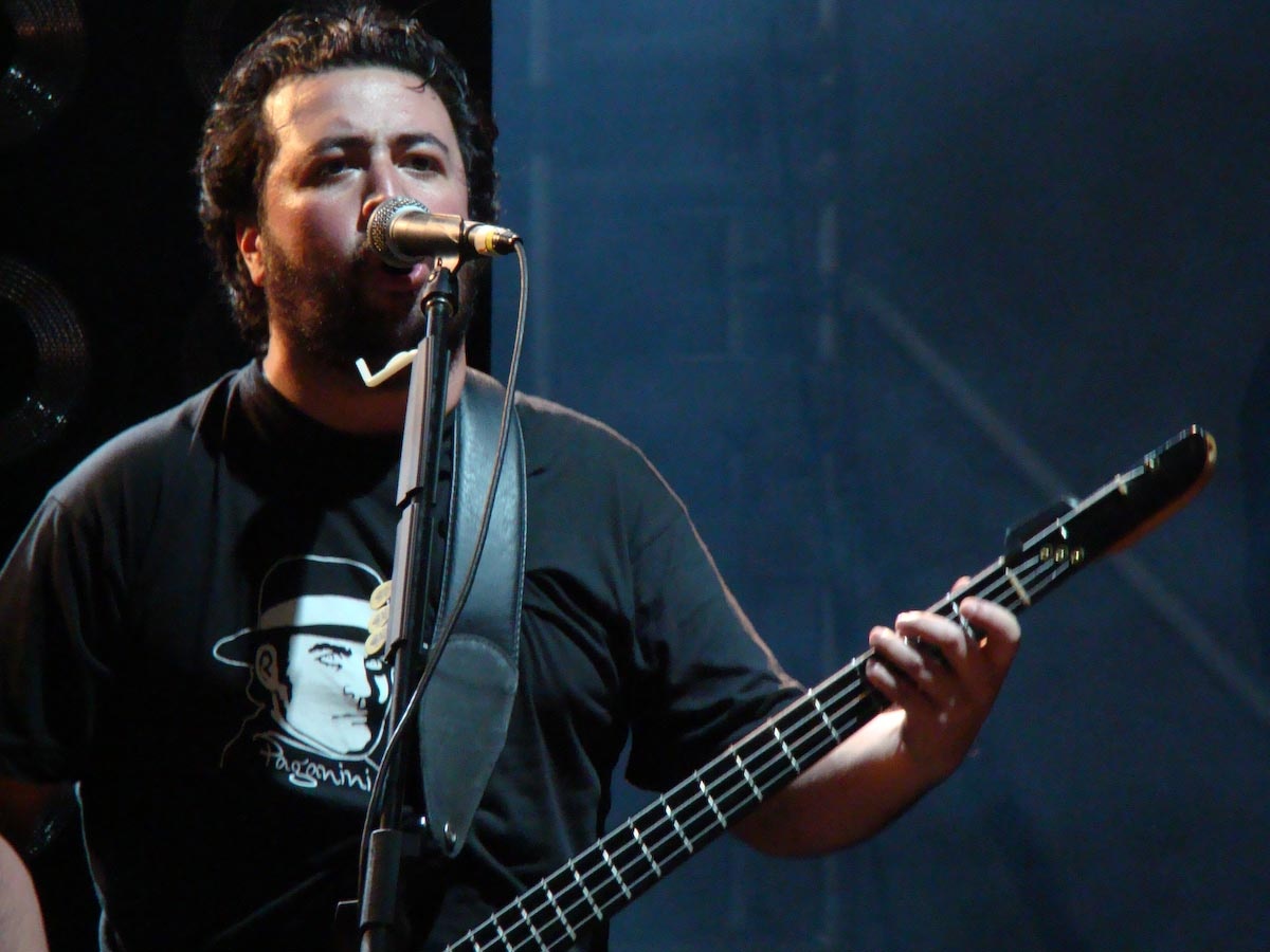 Micky Huidobro